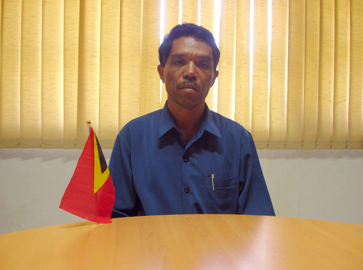 Jose Pina Cardoso, Administrator des Subdistrikts Maucatar